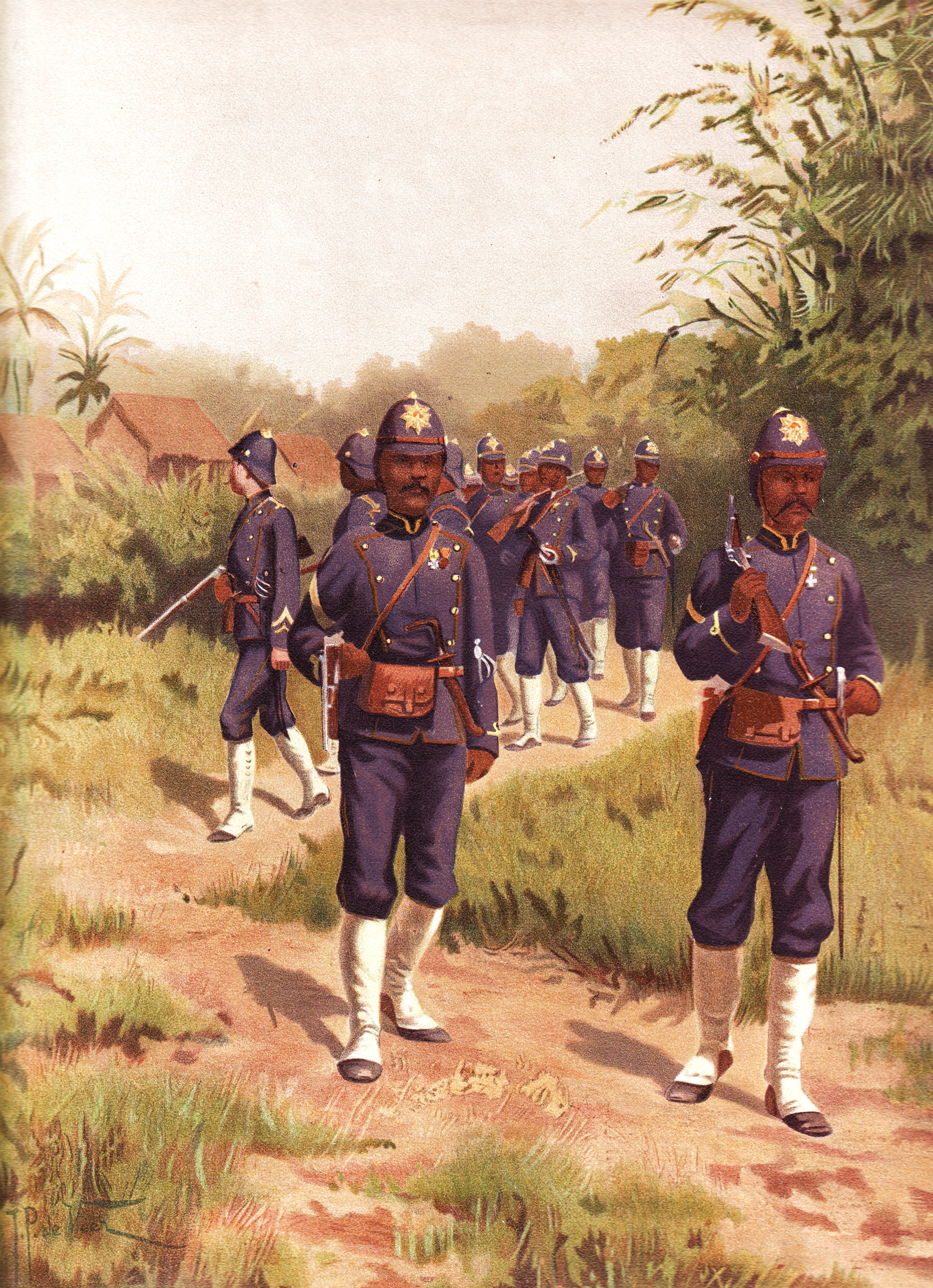 Marechaussees in Nederlands Indie